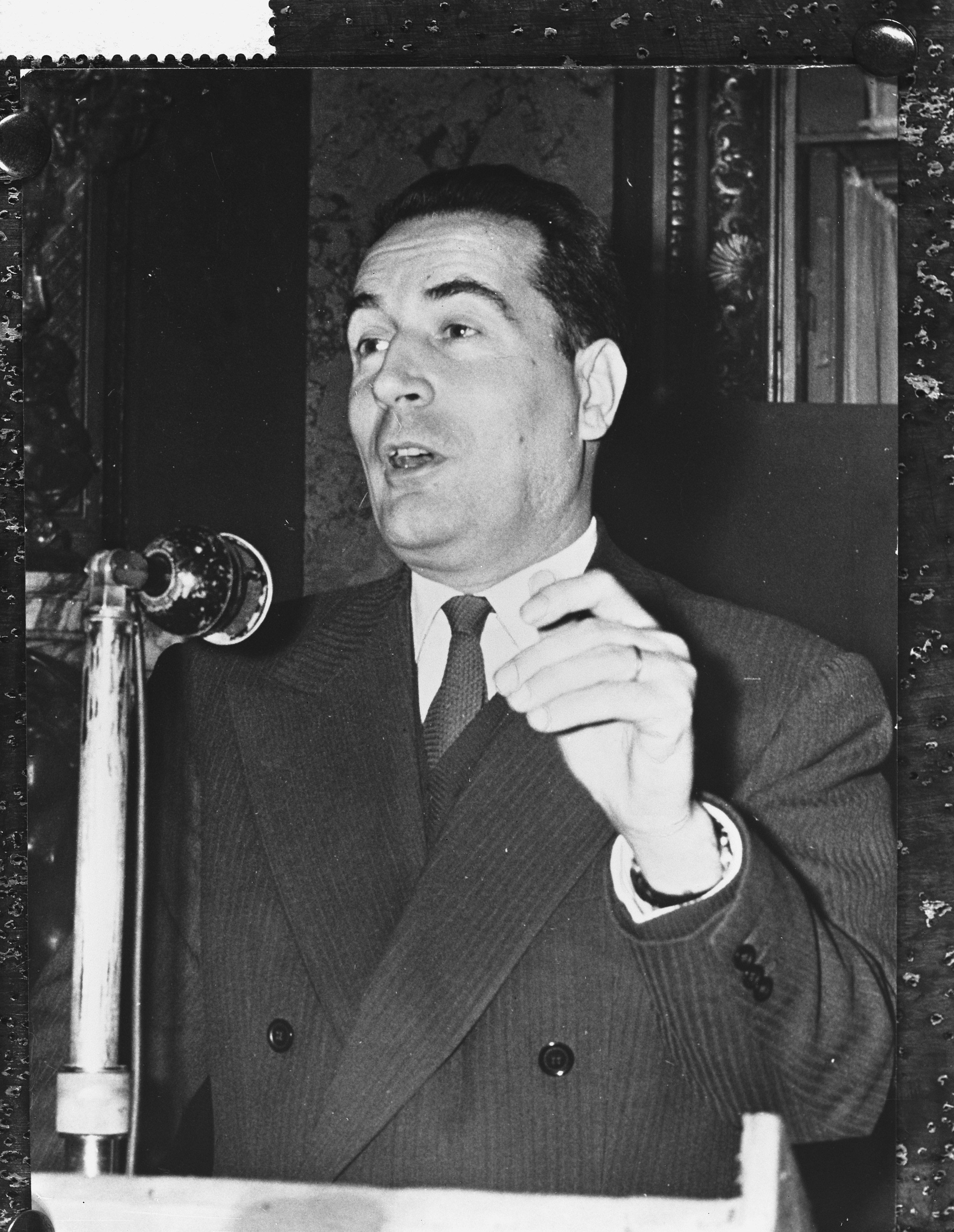 Collectie / Archief : Fotocollectie Anefo Reportage / Serie : [ onbekend ] Beschrijving : Portret van Francois Mitterand Datum : 16 oktober 1959 Trefwoorden : Portretten Persoonsnaam : Mitterand, François Fotograaf : Fotograaf Onbekend / Anefo Auteursrechthebbende : Nationaal Archief Materiaalsoort : Glasnegatief Nummer archiefinventaris : bekijk toegang 2.24.01.09 Bestanddeelnummer : 910-7485